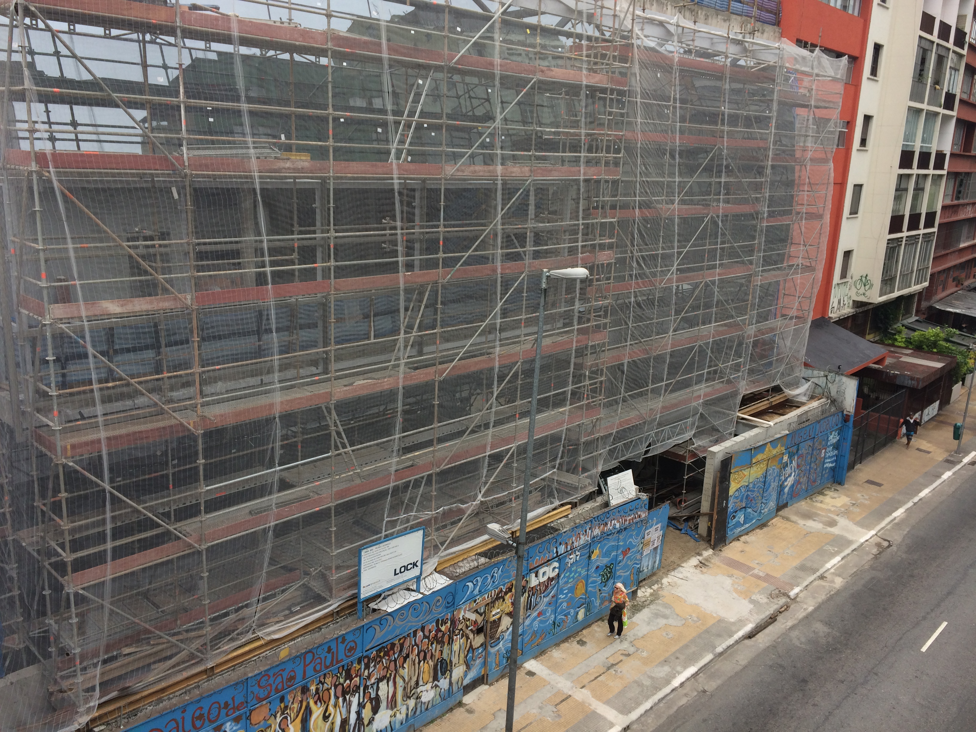 Entrada Alternativa do Museu Judaico de São Paulo em obras, Av. Nove de Julho, São Paulo (SP), Brasil